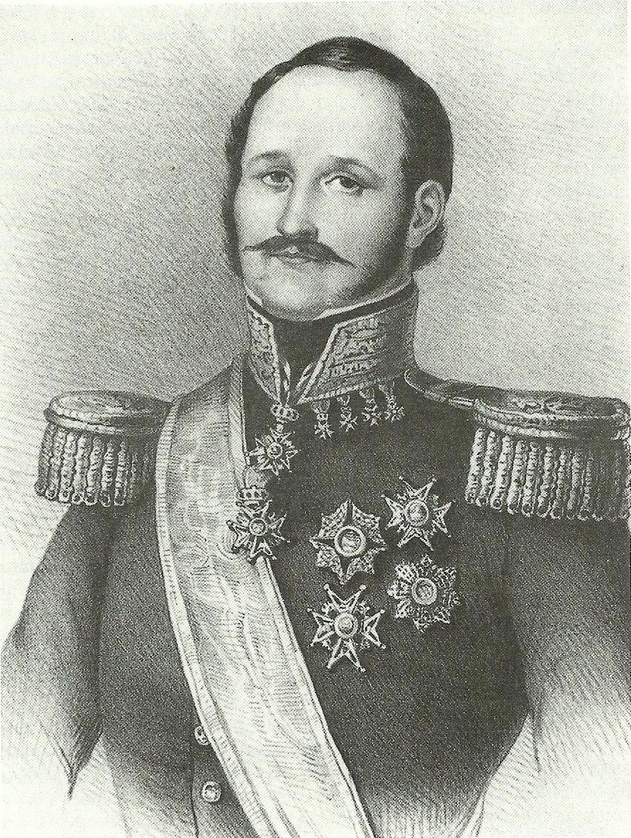 Ritratto del principe Alessandro I Gonzaga.